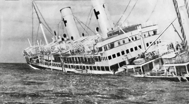 Il relitto della nave ospedale Tevere affondata su mina fuori Tripoli